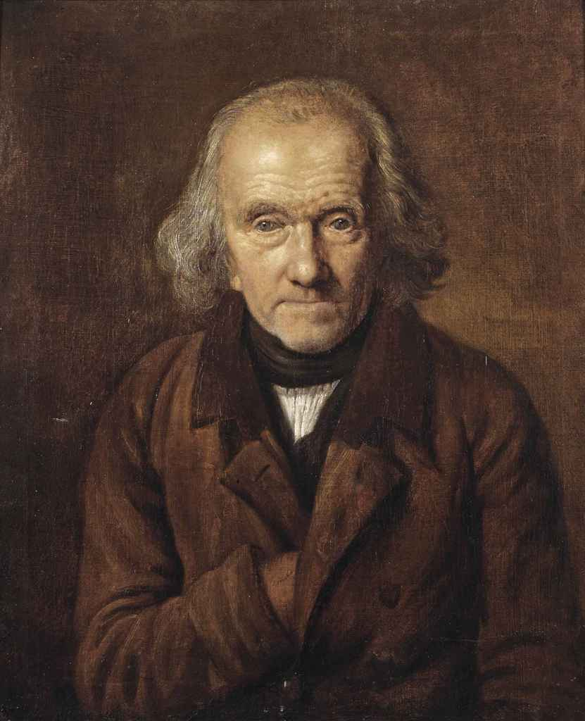 Léonard Defrance (1735–1805): Selbstporträt des Malers im hohen Alter. Öl auf Leinwand, 65,2 x 54,8 cm.